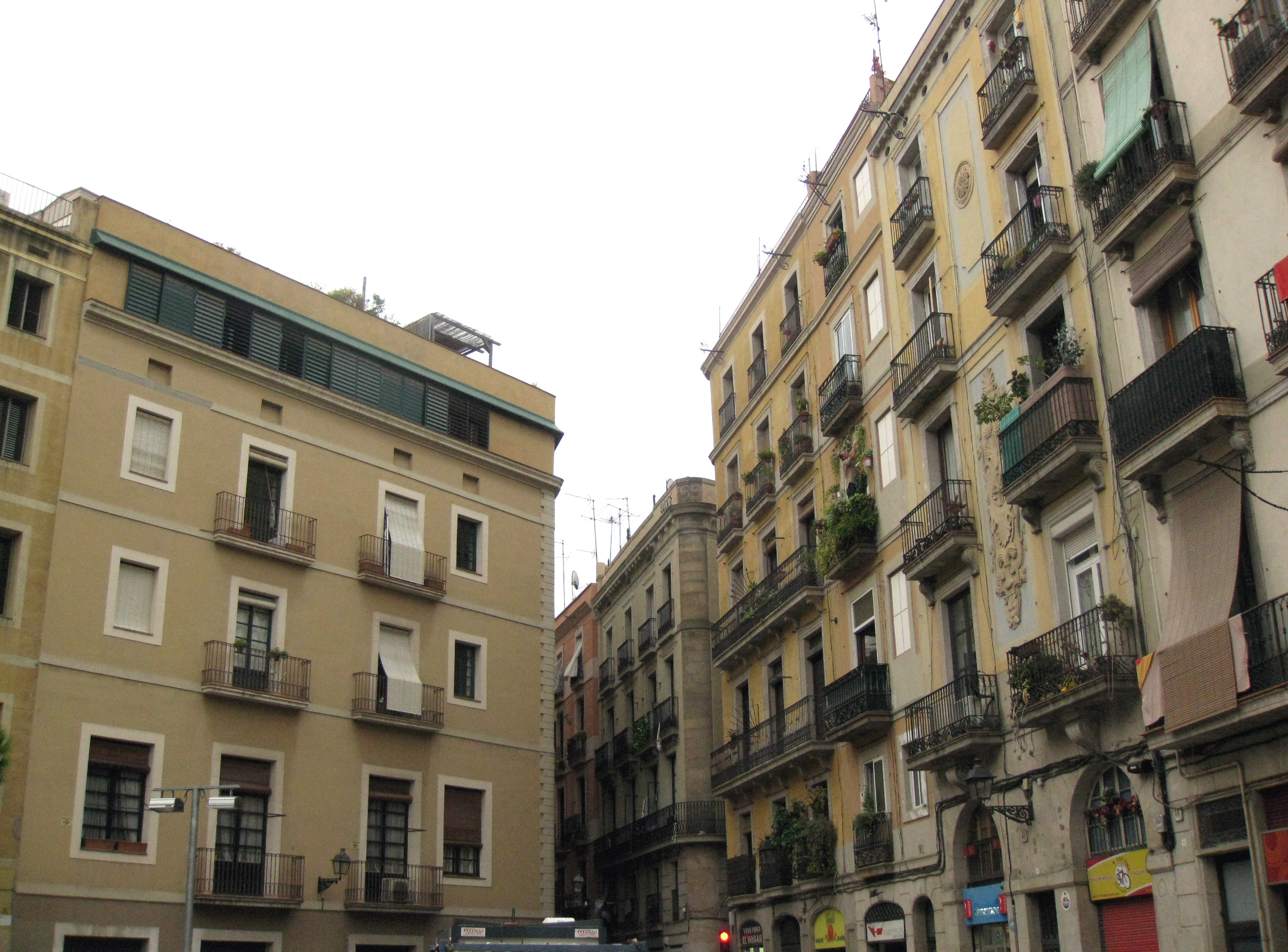 Plaça de George Orwell, costat nord-est, al barri Gòtic de Barcelona. A mà dreta hi destaca un edifici amb la façana decorada amb plafons de terracota.